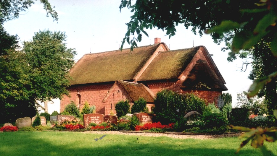 Die Klanxbüller Kirche (Kreis Nordfriesland) ist die einzige reetgedeckte Kirche auf dem nordfriesischen Festland.